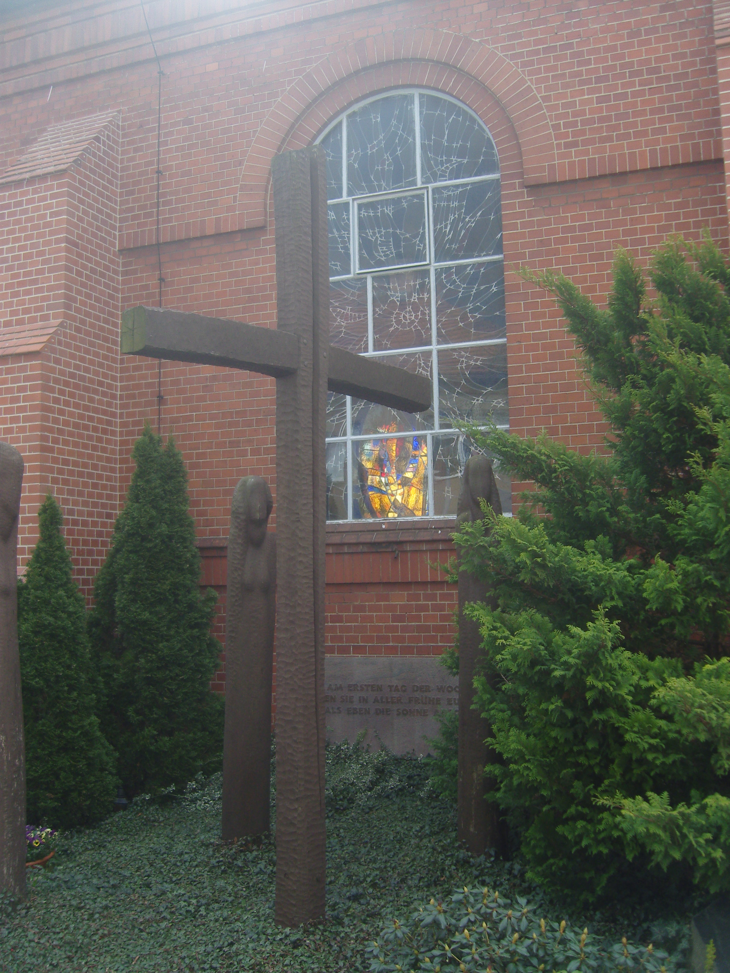 Fenster der Katholischen Kirche in Senftenberg